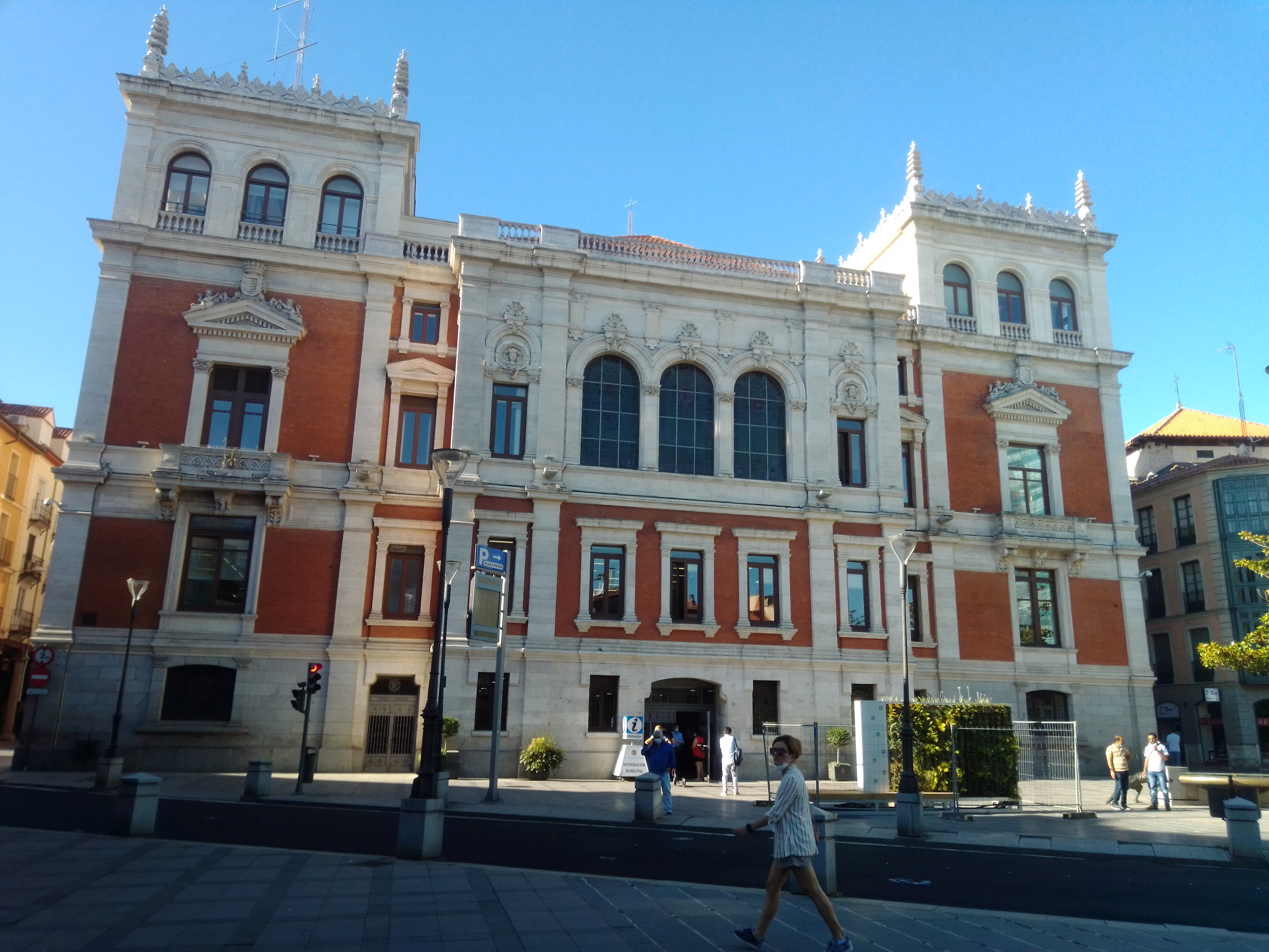 Edificio del Ayuntamiento de Valladolid por la parte de atrás.